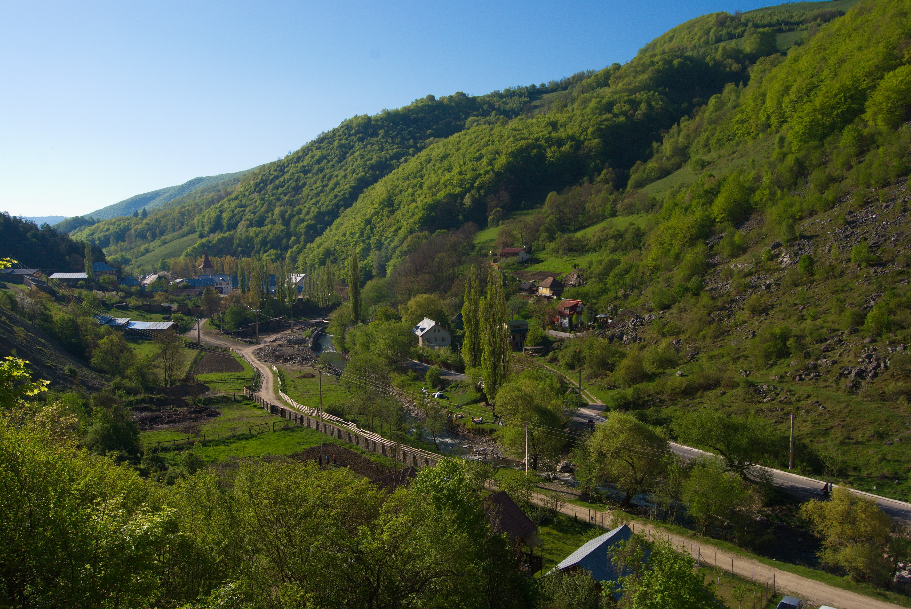 Valea Manastirii, Ramet